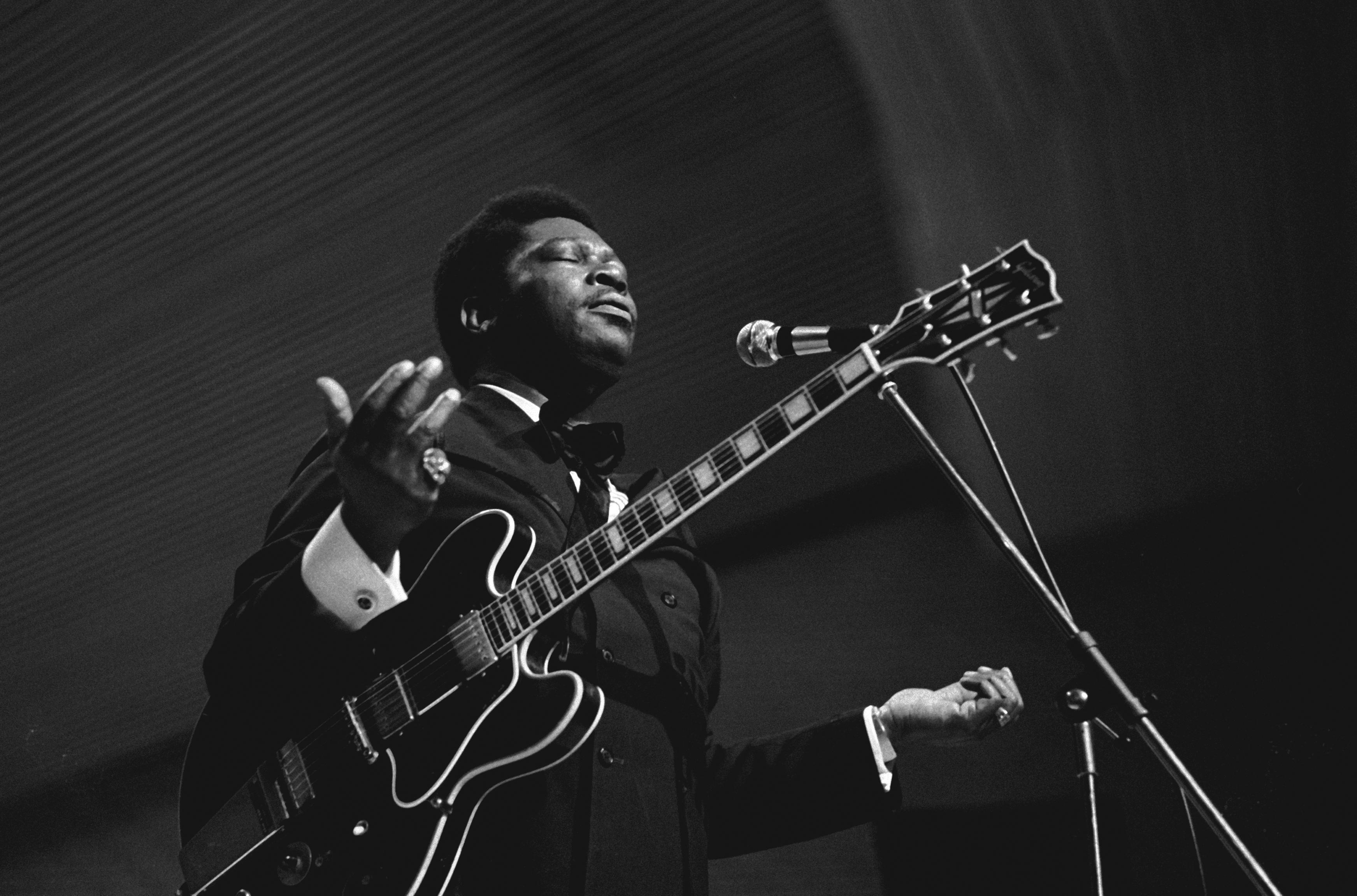 B.B. King Live with "Lucille" im Audimax der Uni Hamburg, November 1971